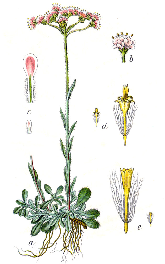 Antennaria dioica (L.) P. Gaertn., syn. Gnaphalium dioicum L. Original Caption Gemeines Katzenpfötchen, Gnaphalium dioecum